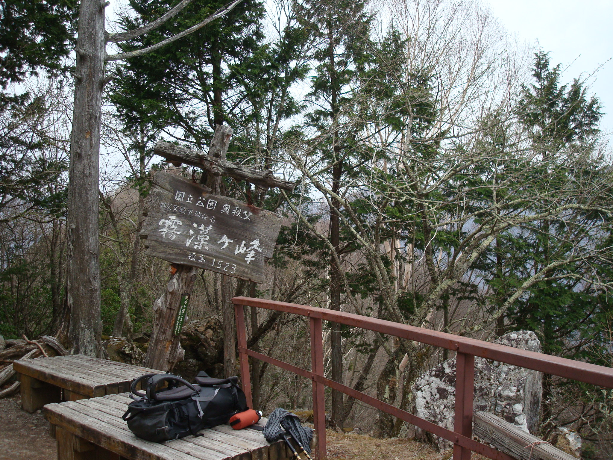 霧藻ヶ峰にて